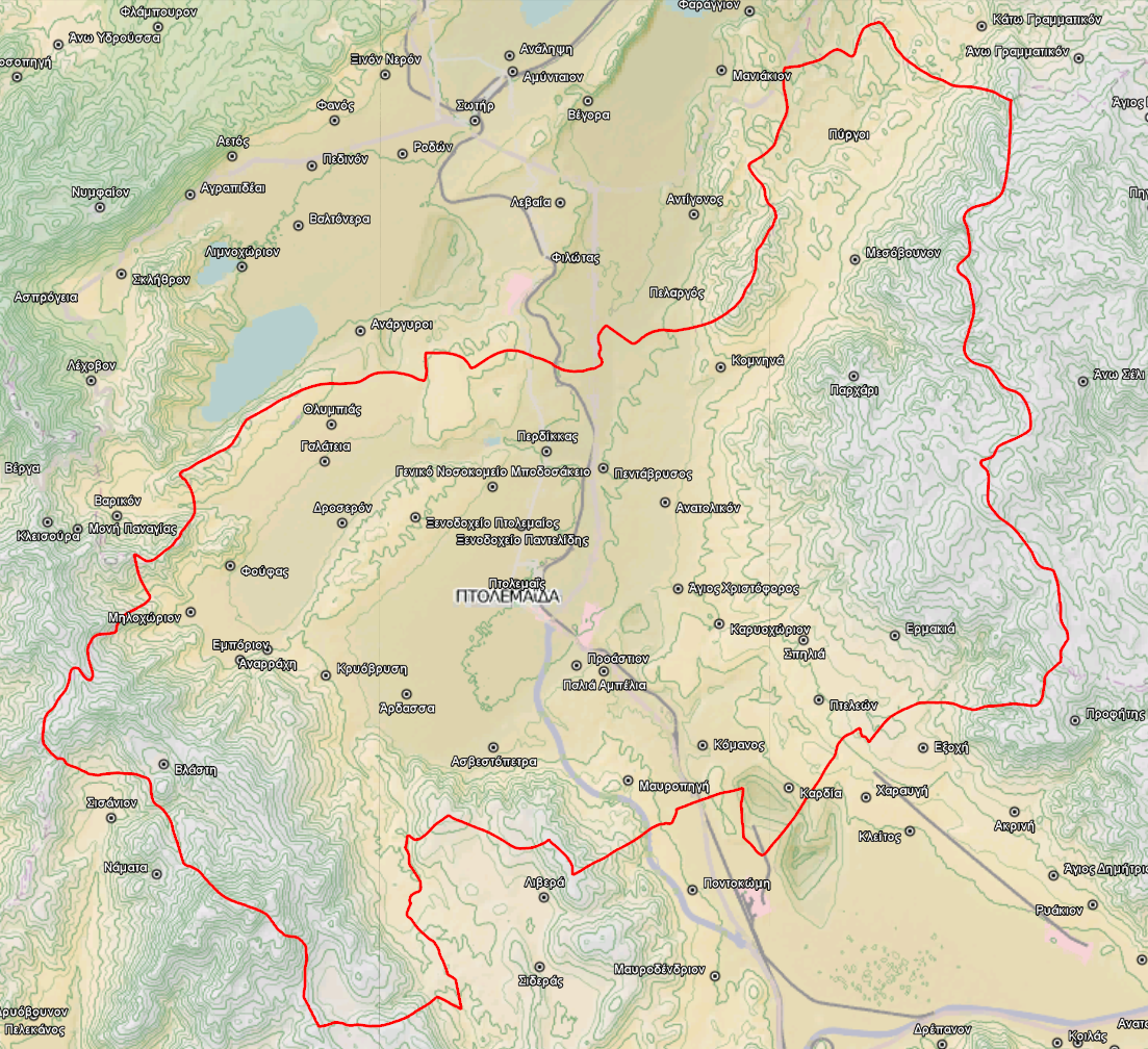 Τοπογραφικός χάρτης του Δήμου Εορδαίας